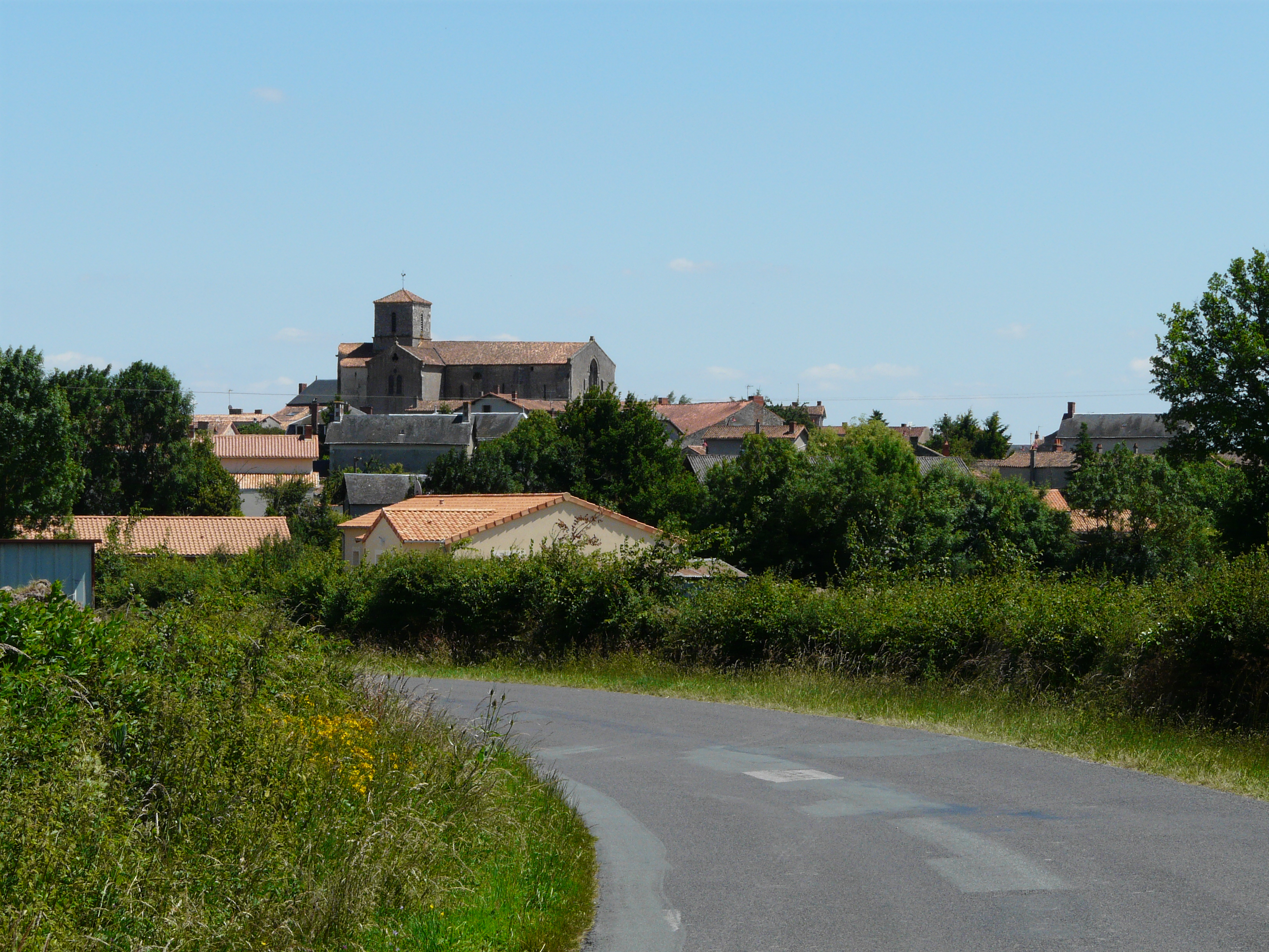 Vue générale de Gourgé, Deux-Sèvres, France